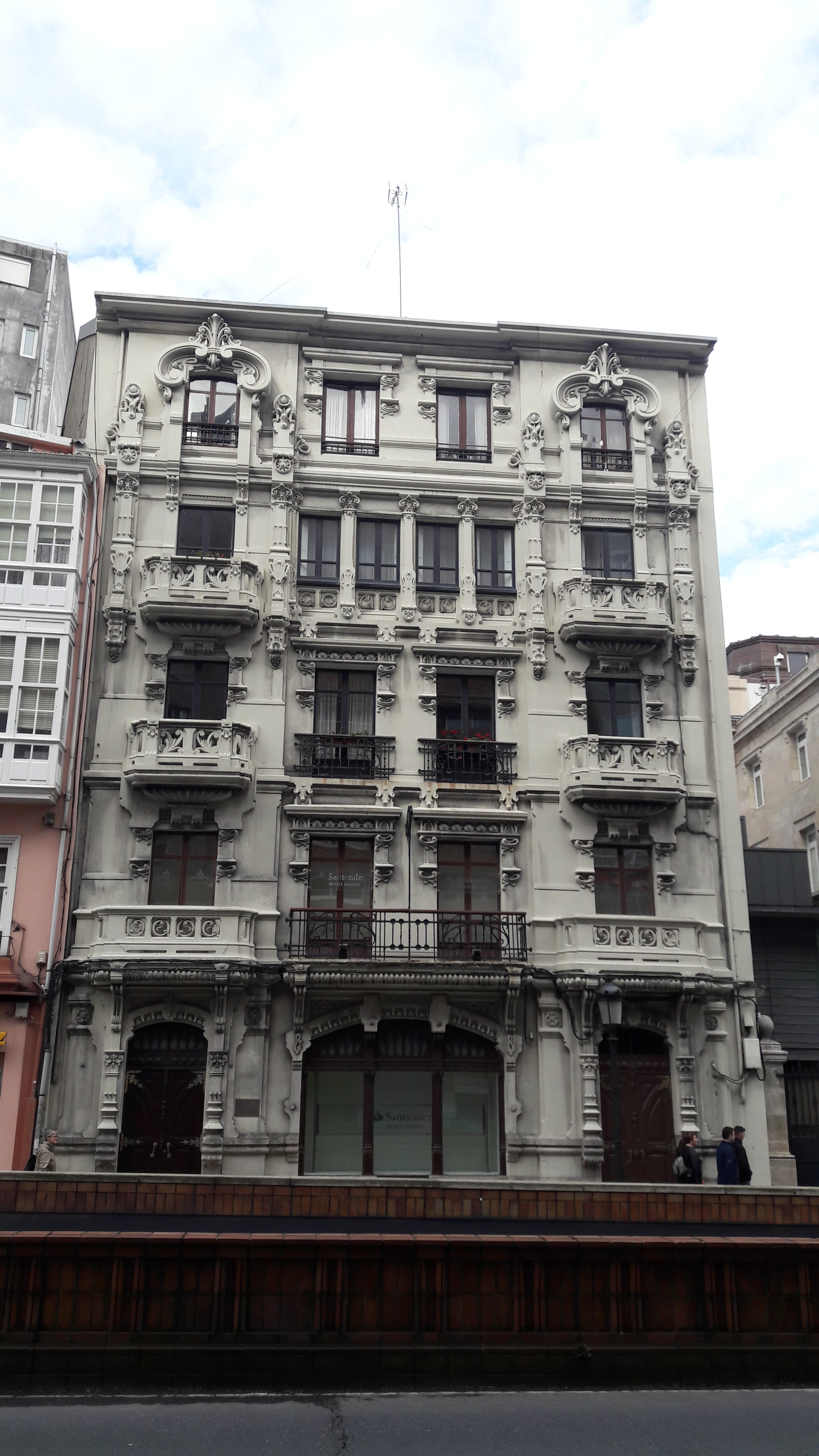 Edificio modernista de Julio Galán Carvajal na rúa de Juana de Vega na Coruña